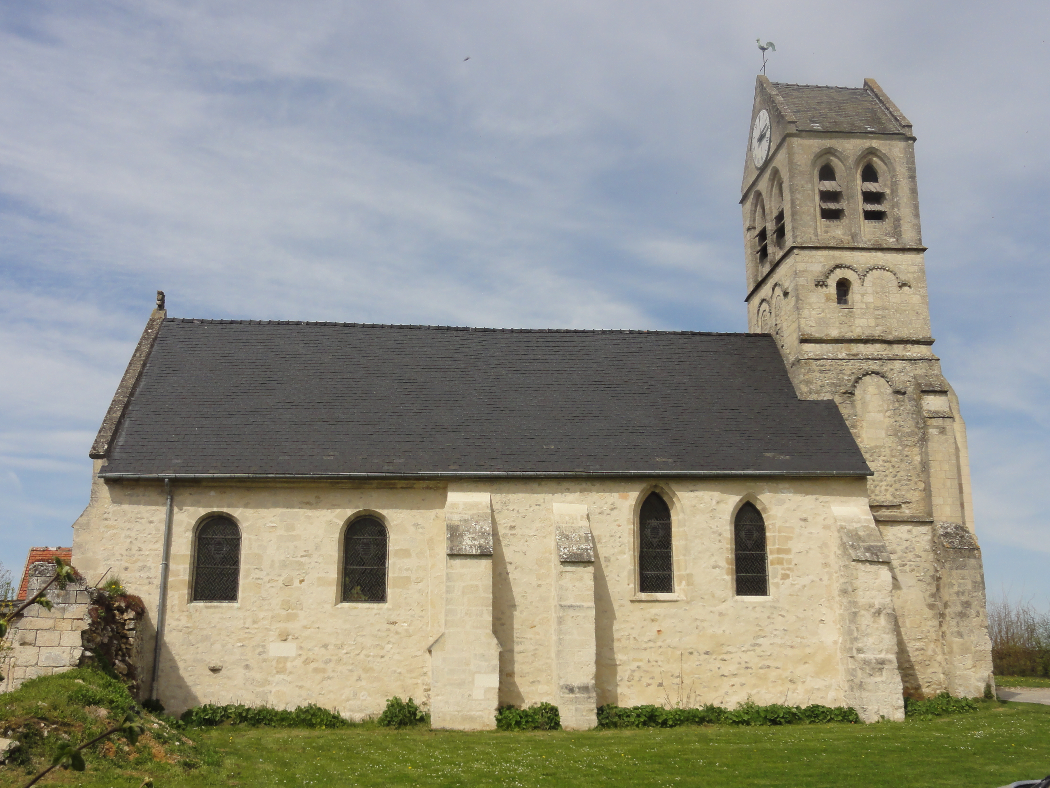 Église Saint-Pierre de Duvy (voir titre).